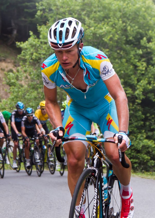 037 vino